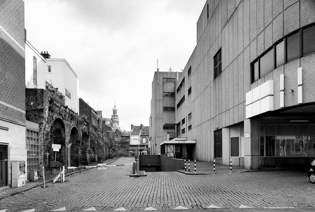 Winkelcentrum: Exterieur overzicht Preekherengang, links Stadswal en rechts Entre Deux